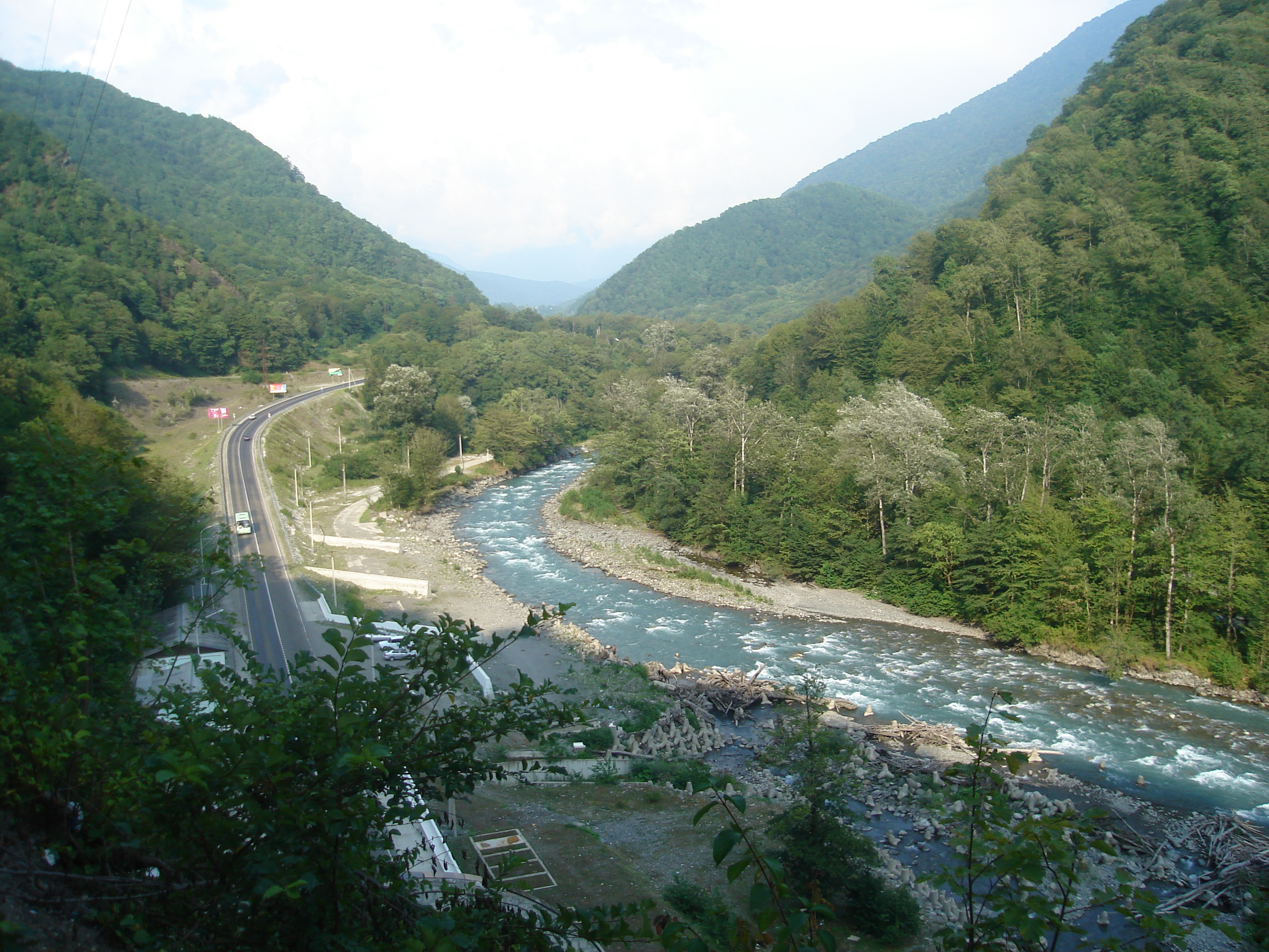 Mzymta from Maidens' Eyewater waterfall Мзымта, вид с водопада Девичьи Слёзы